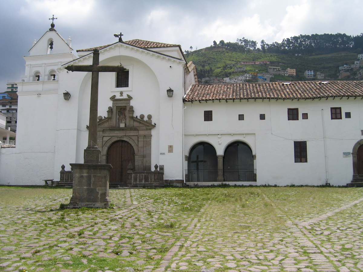 Capilla y Convento Franciscano de San Diego, Quito, Ecuador.